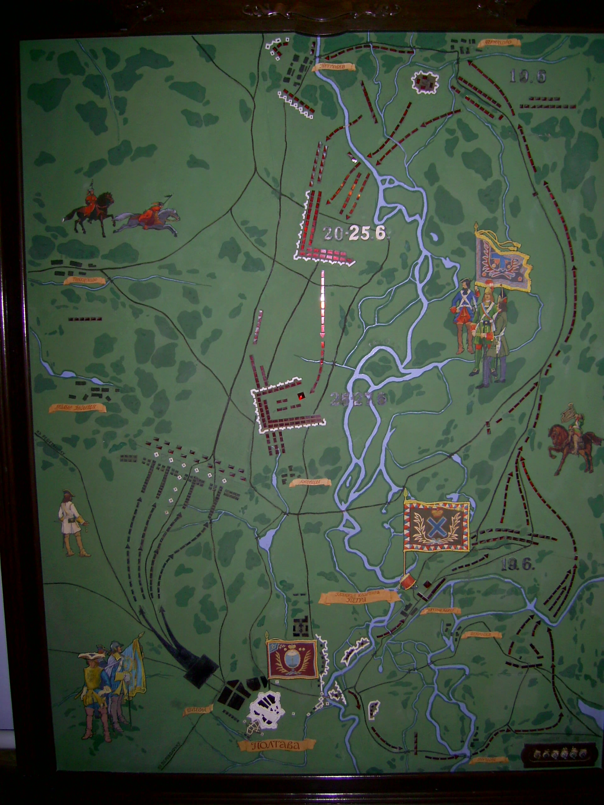 Музей «Поле Полтавської битви». Експонати